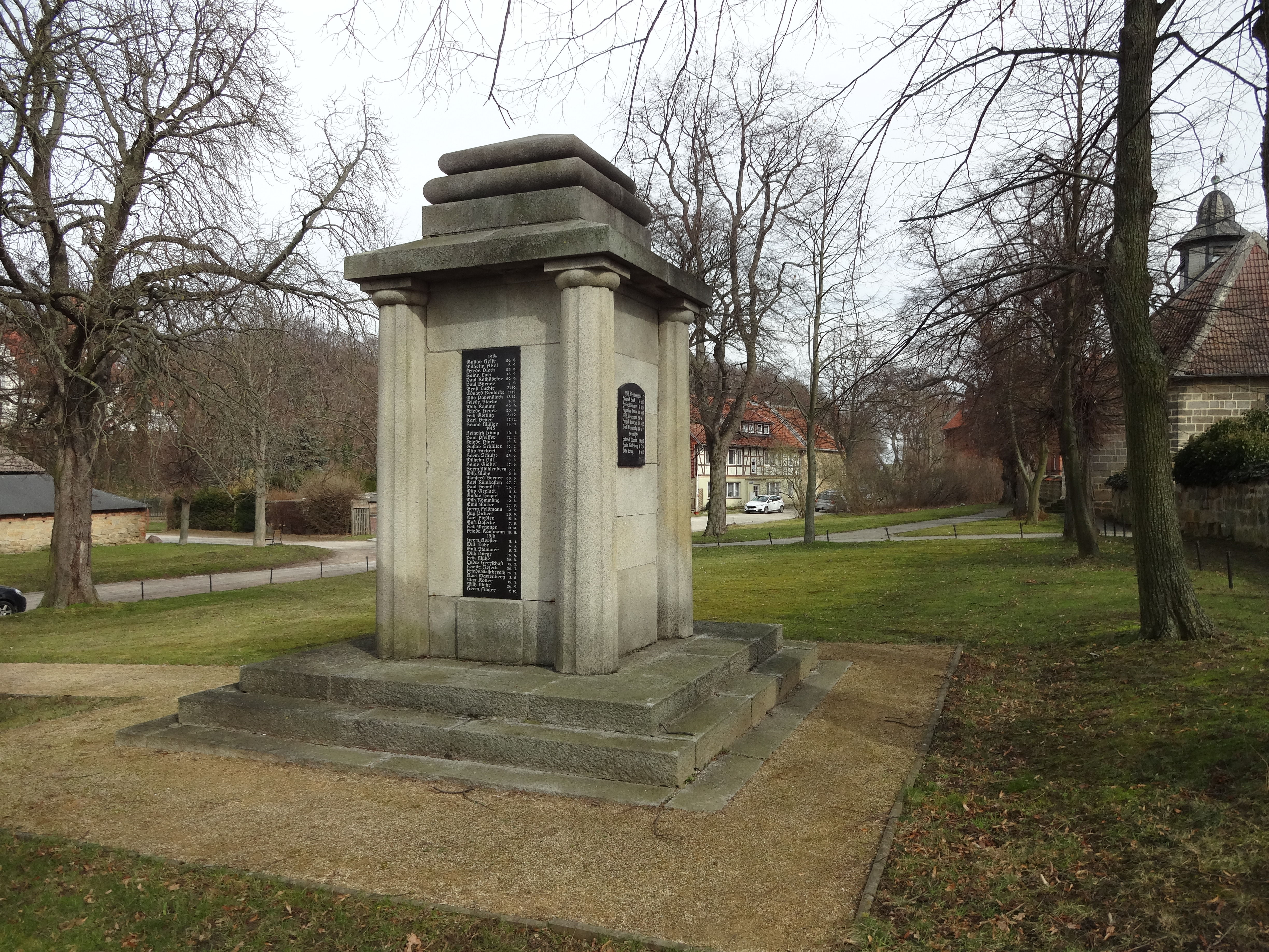 denkmalgeschütztes Kriegerdenkmal für die Gefallenen des Ersten Weltkriegs in Derenburg, Ortsteil von Blankenburg (Harz)